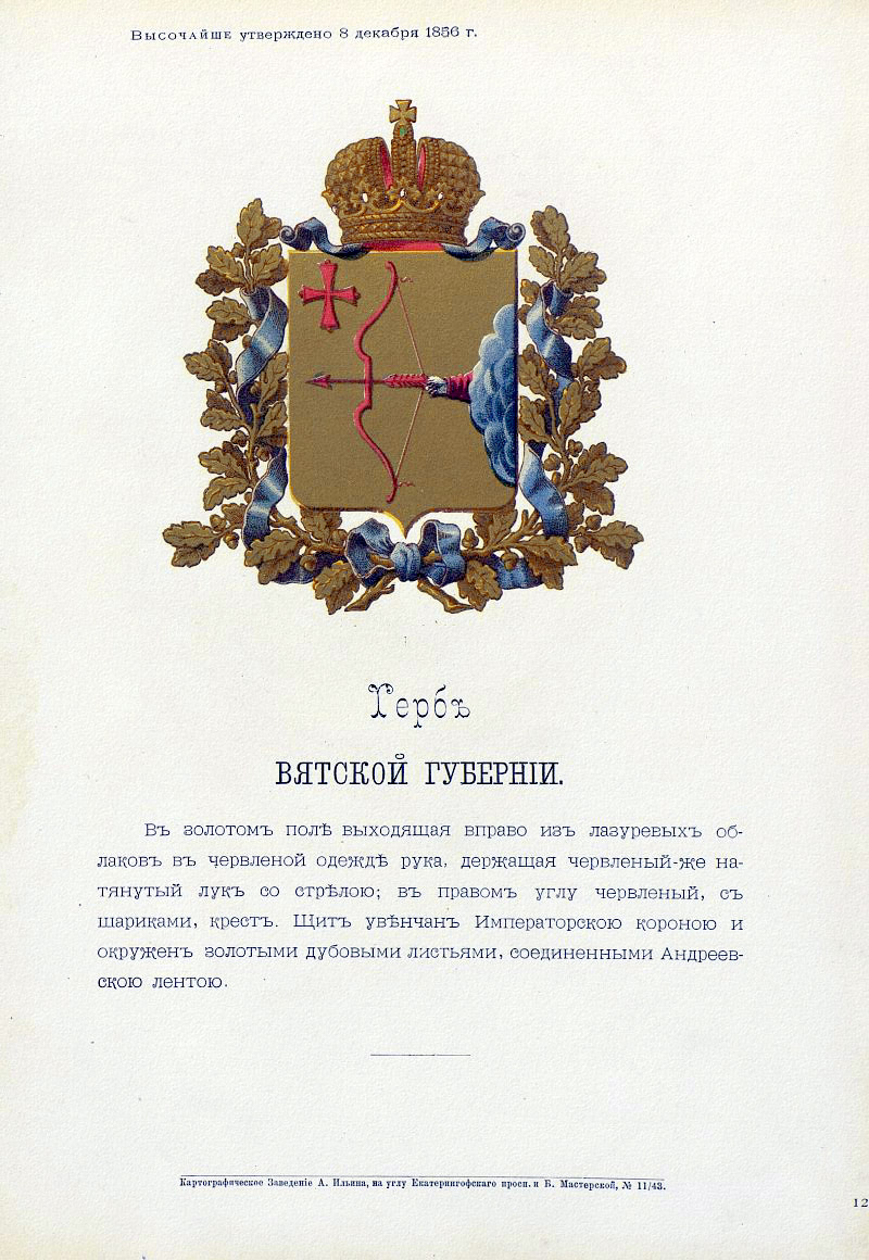 Official Russian Empire coat of arms Viatka Governorate. Герб Российской Империи Вятской губернии с официальным описанием в Гербовнике Министерства внутренних дел Российской Империи 1880 года. Утверждён Императором Всероссийским Александром Вторым.